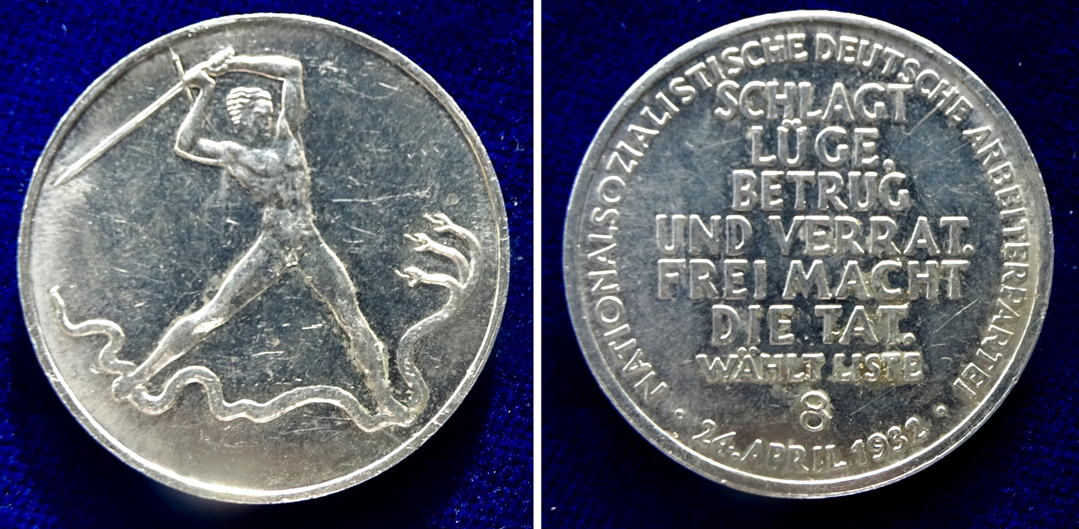 Al, d.= 34 mm. Krieger mit erhobenem Schwert n.r. über dreiköpfiger Schlange/ 8 Z.: "SCHLAGT LÜGE, BETRUG UND VERRAT. FREI MACHT DIE TAT. WÄHLT LISTE 8", Umschrift : "· NATIONALSOZIALISTISCHE DEUTSCHE ARBEITERPARTEI · 24. APRIL 1932 ·" Erhaltung: Sehr schön.